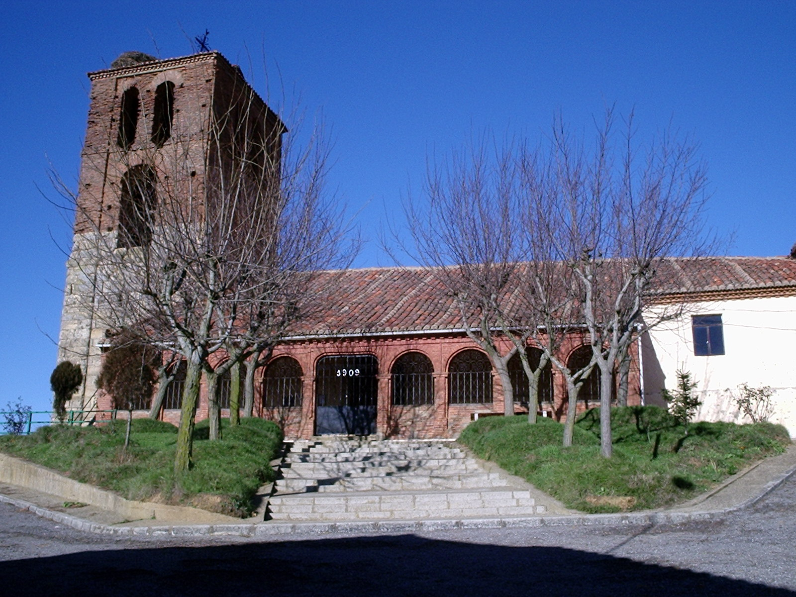 Church of/Iglesia de: "El Dulce nombre de María" in/en Villamartín de Don Sancho (León, Spain)